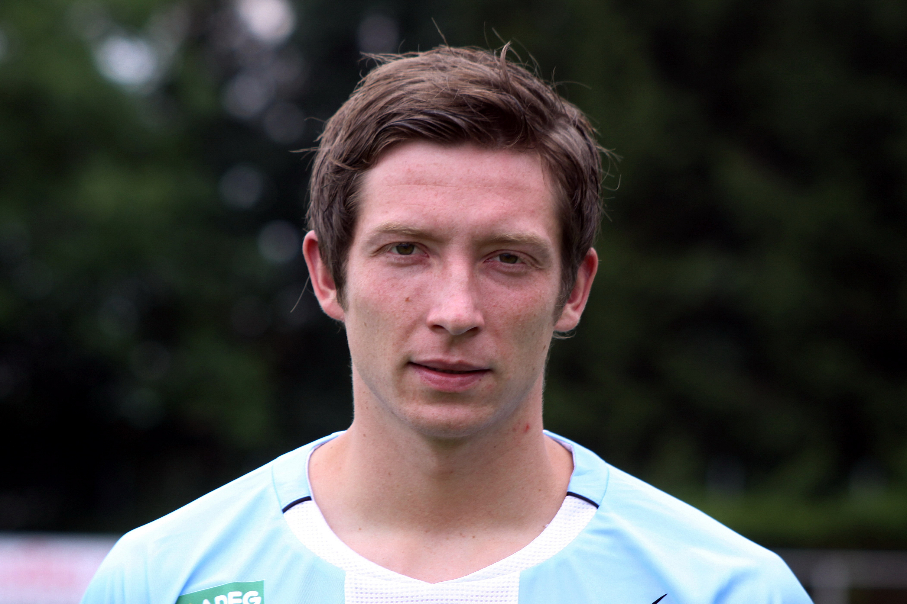 Robert Gamperl - TSV Hartberg (2)